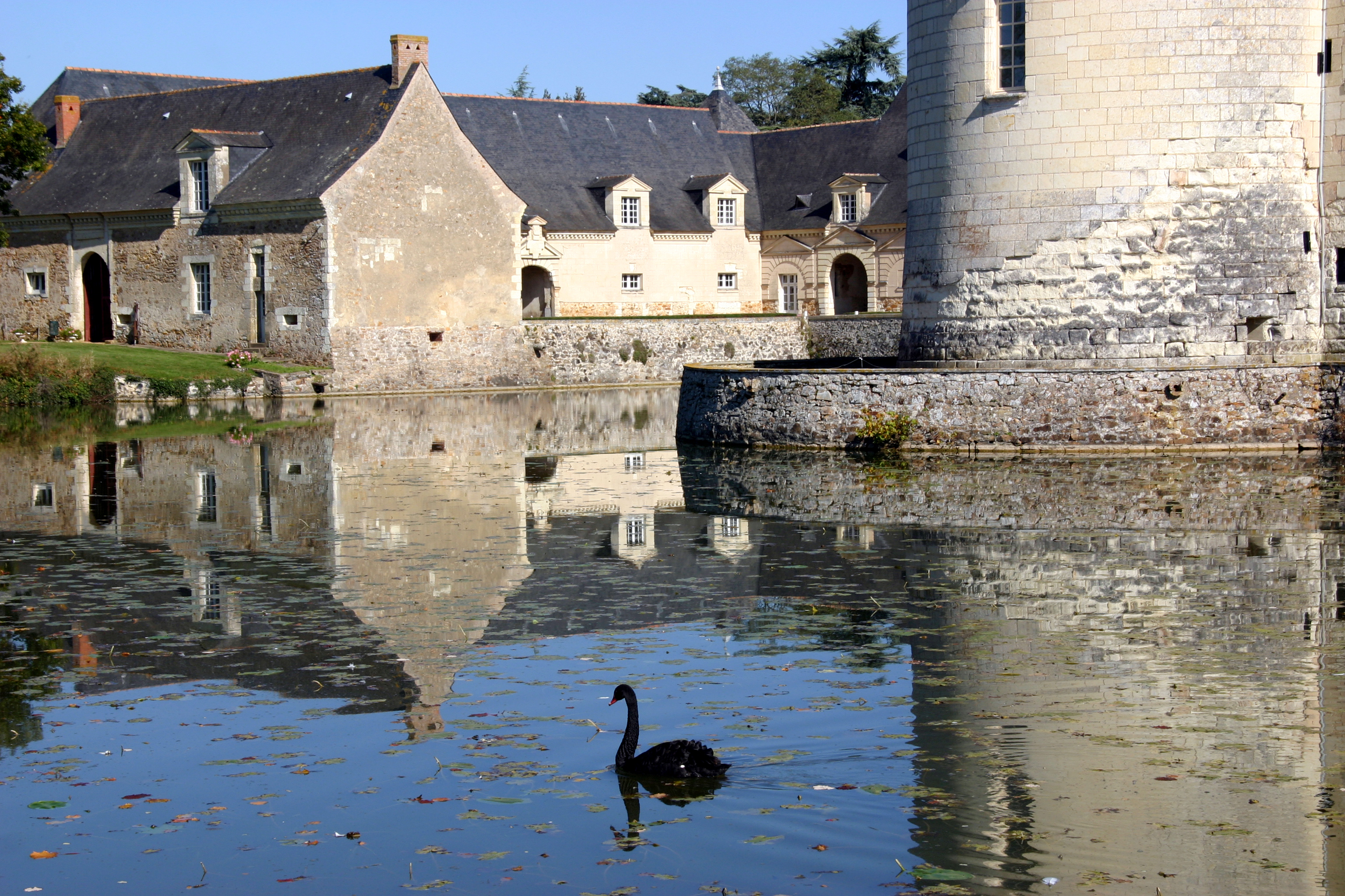 Schloss Plessis-Bourré